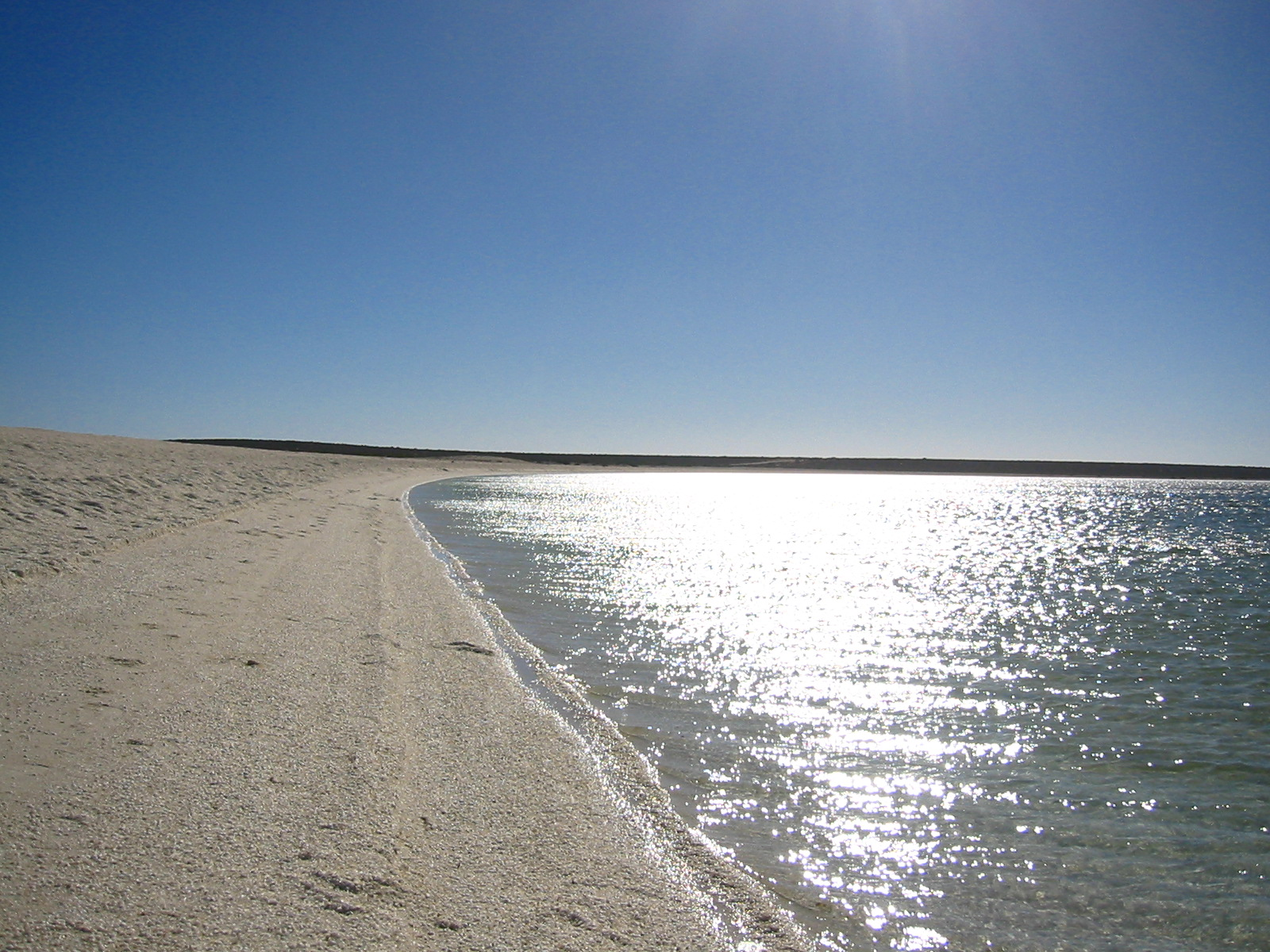 wie der Name es sagt, hier gibt es keinen Sand, nur Muscheln